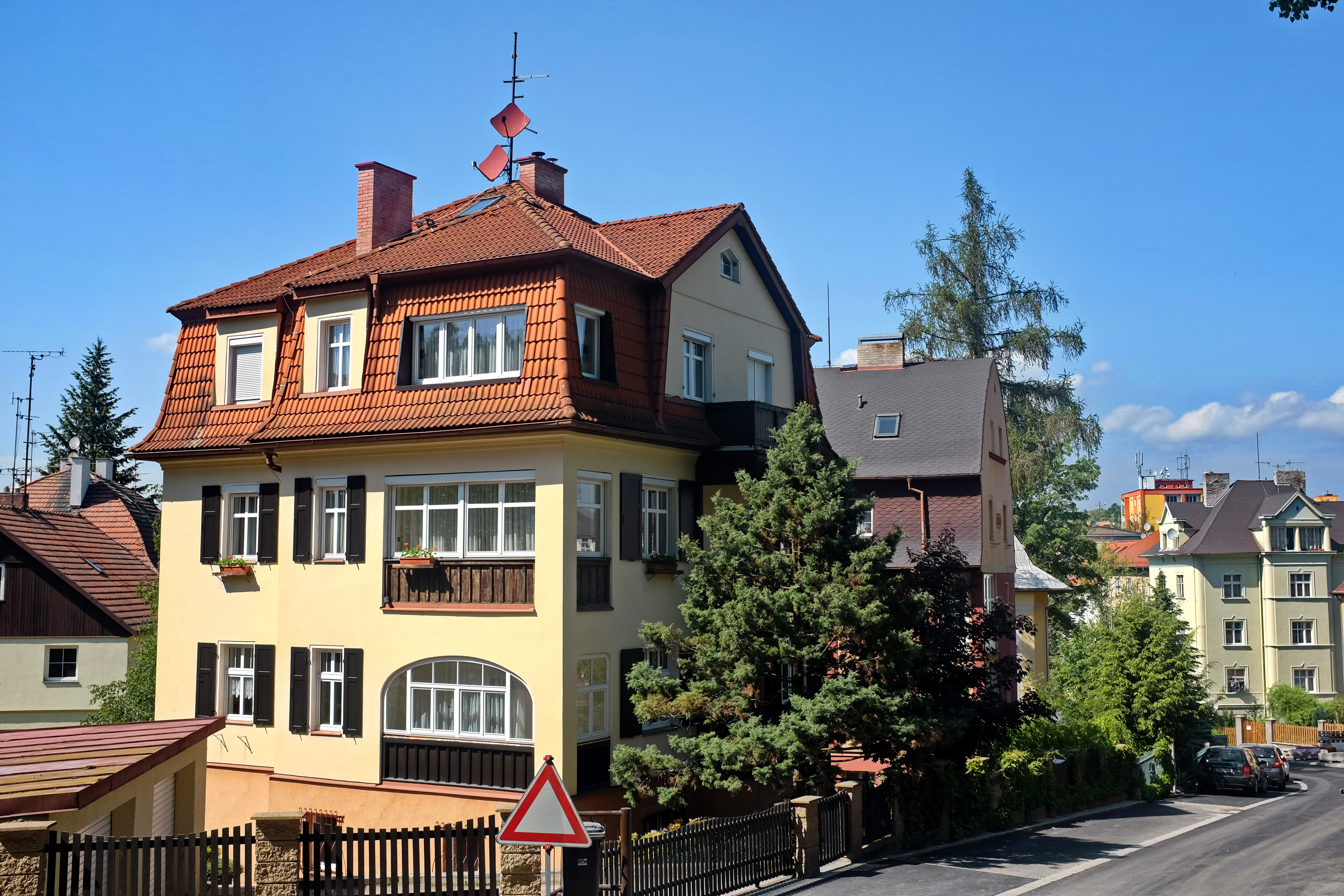 Karlovy Vary, místní čtvrť (ZSJ) Tuhnice, Chelčického ulice